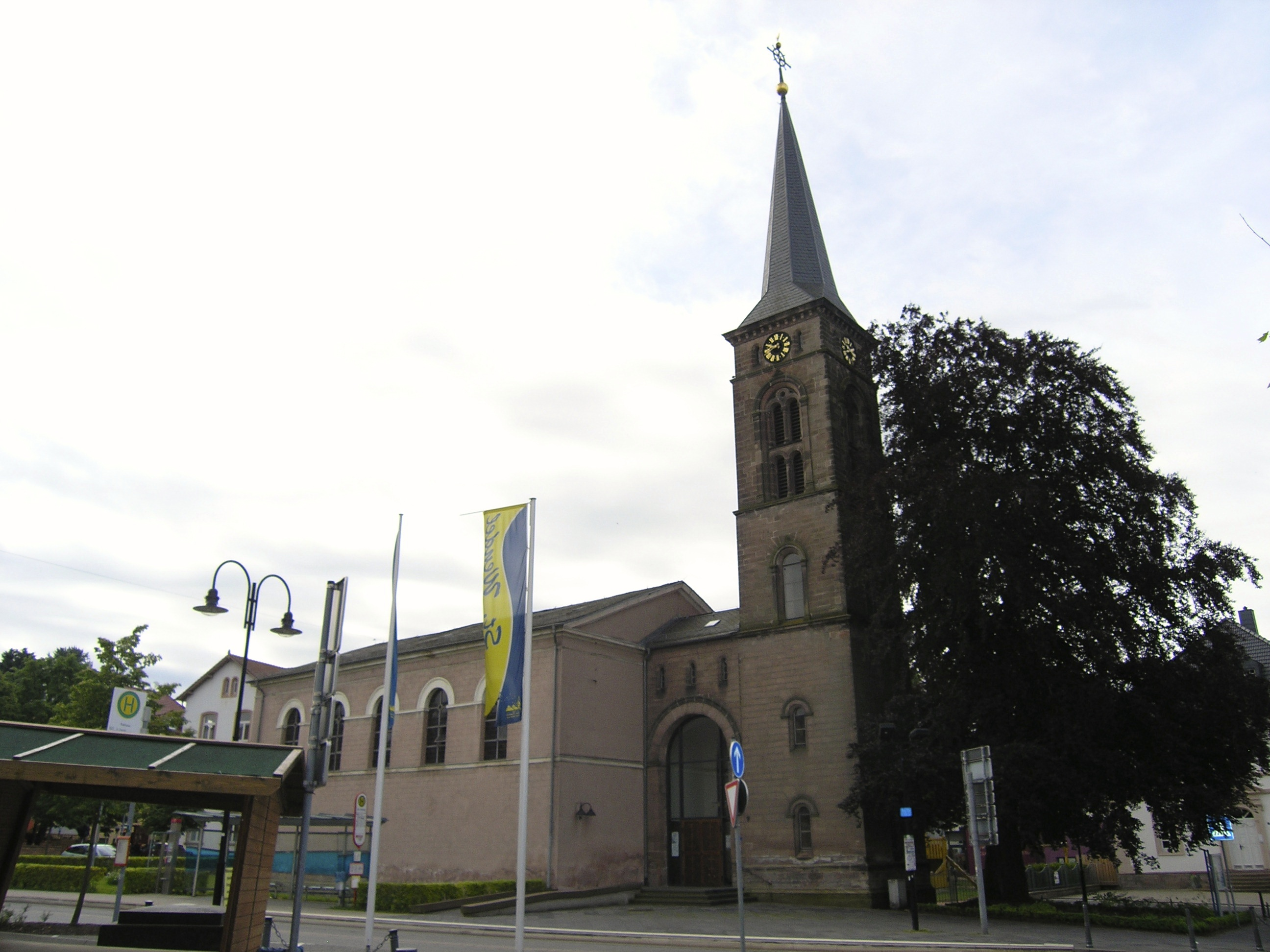 die evangelische Stadtkirche St. Wendel, Ansicht vom Schlossplatz.